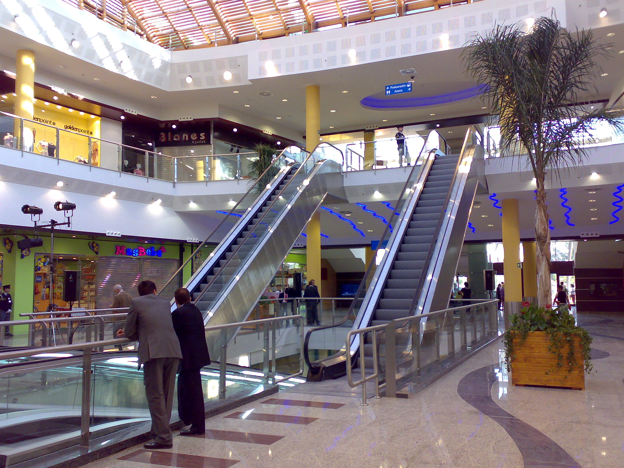 Las escaleras maecánicas de la entrada del centro comercial Centro comercial Águilas Plaza (Águilas, Murcia), momentos antes de la inauguración oficial.